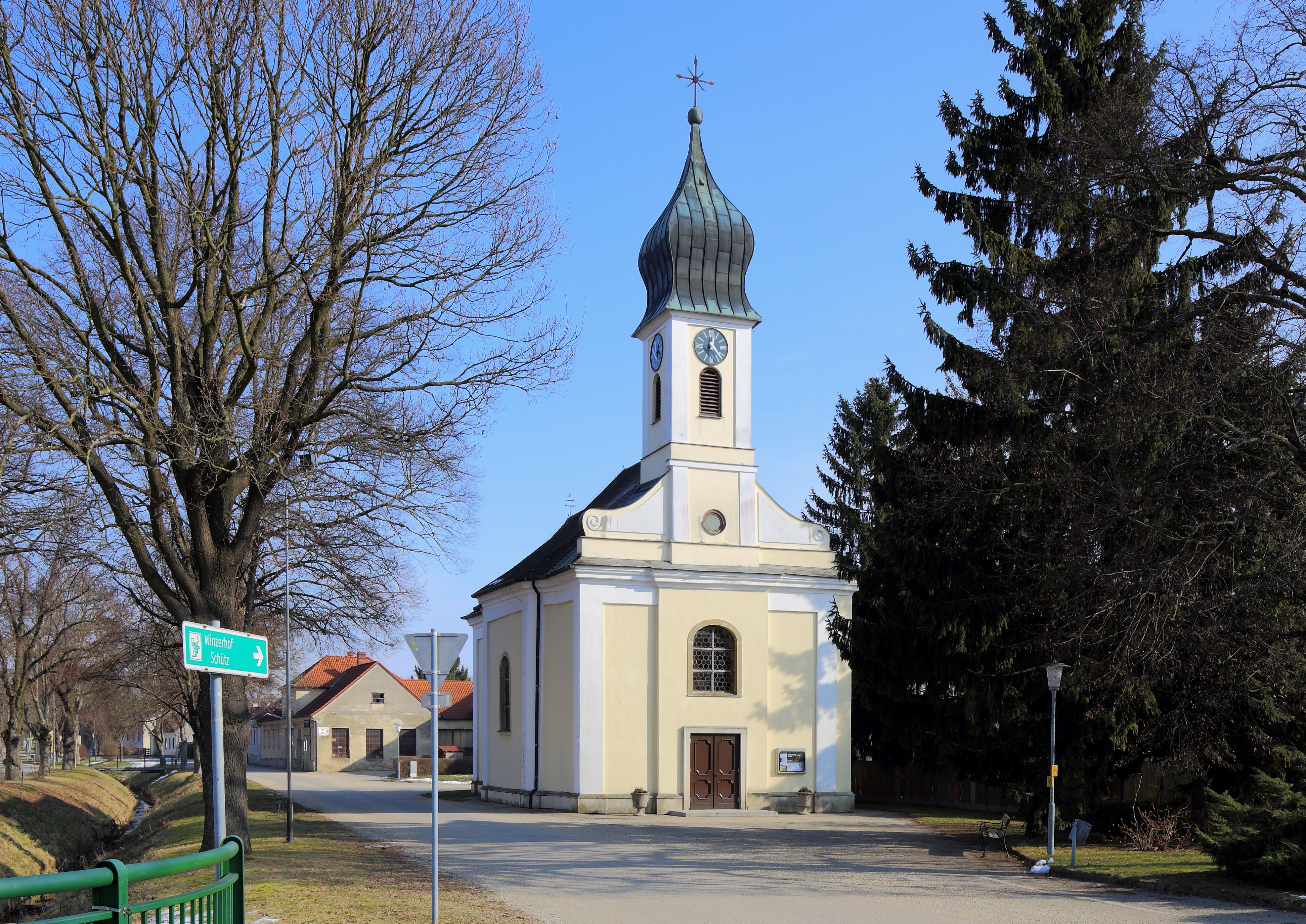 Katholische Pfarrkirche hl. Johannes Nepomuk in Traunfeld, ein Ortsteil der niederösterreichischen Gemeinde Hochleithen.